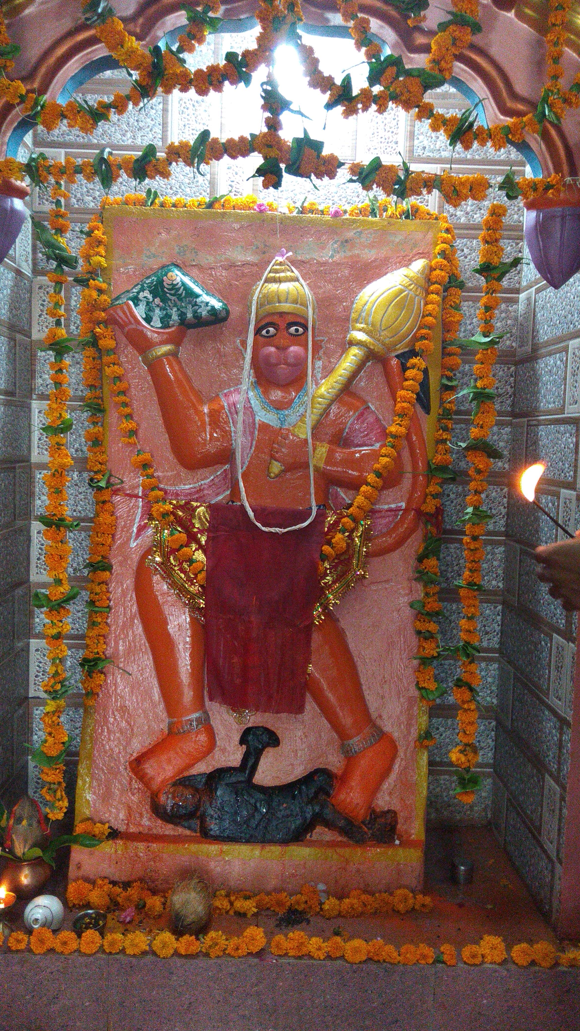 हनुमान जी